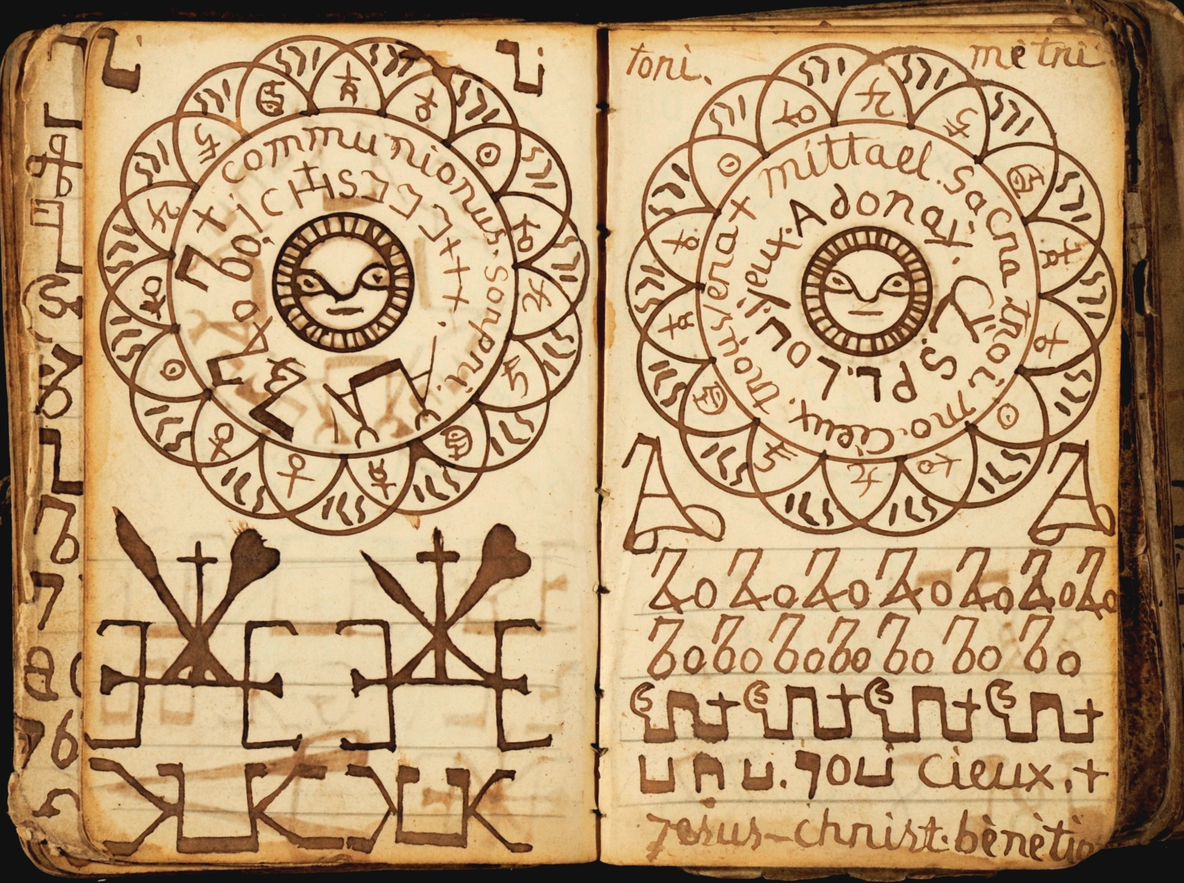 Pierre Richard 1802-1879 Double page de l'album enchiridion